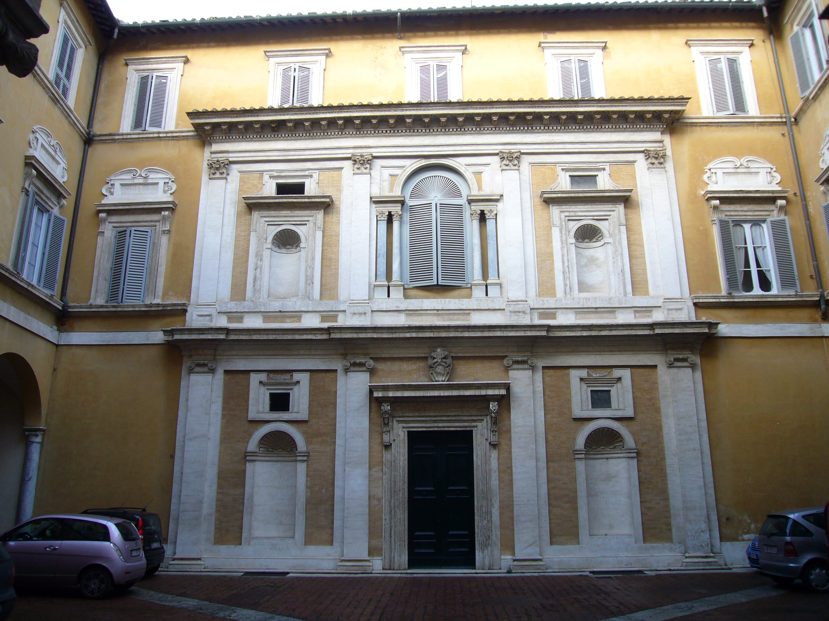 Roma, palazzo Firenze ai Prefetti, cortile (sede della Società Dante Alighieri)